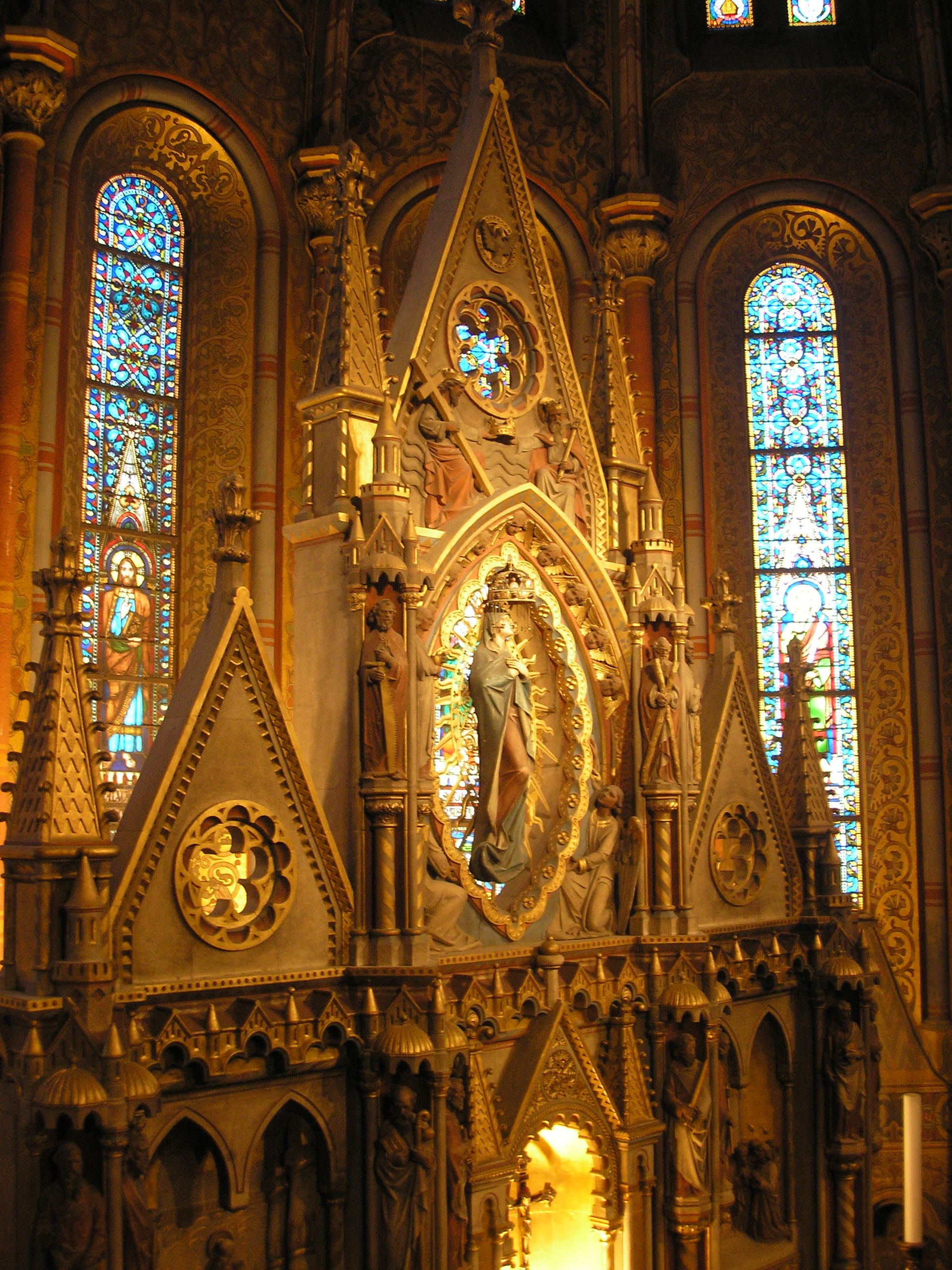 Marienstatue am Altar der Matthiaskirche in Buda